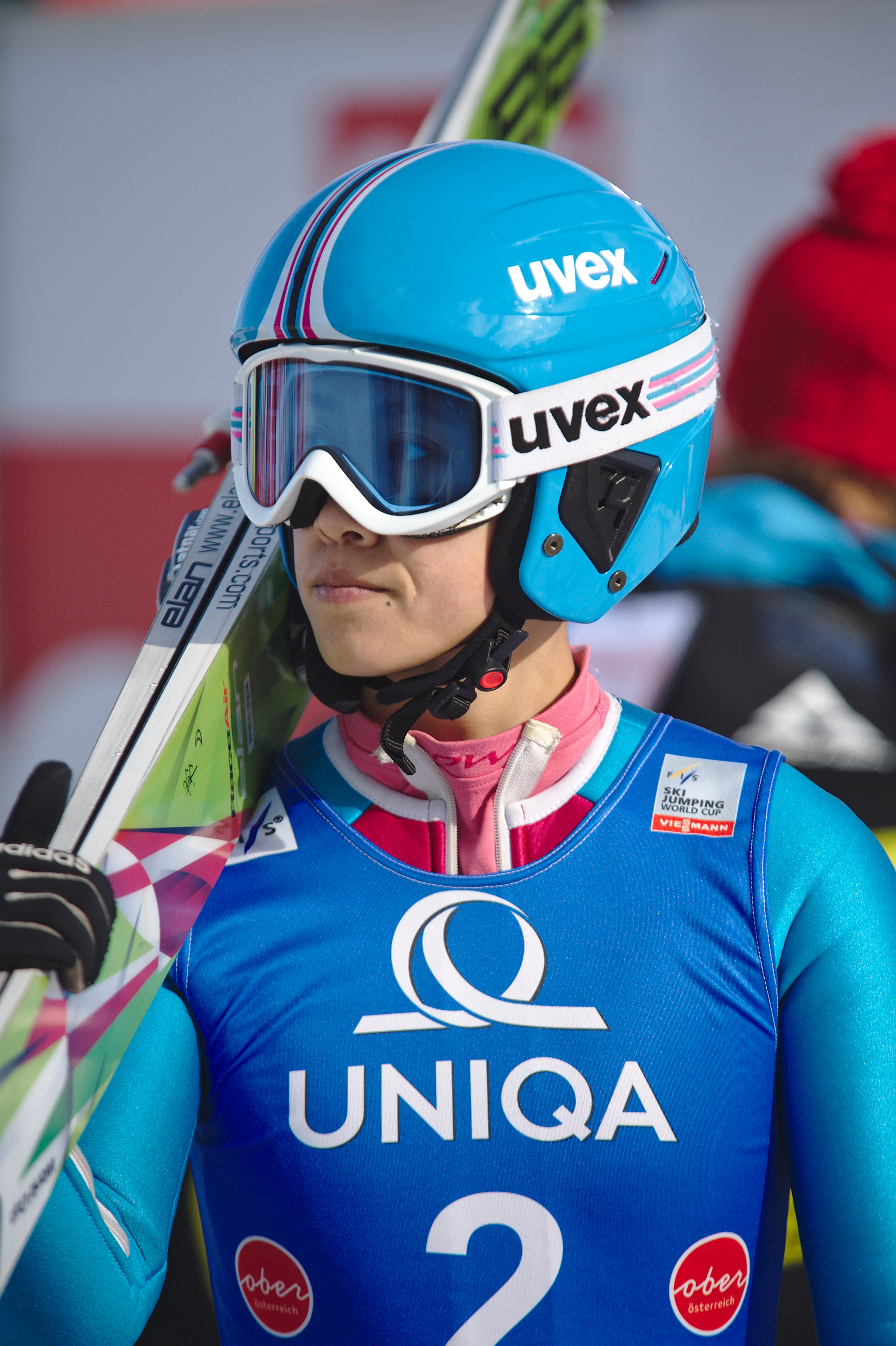 FIS Ski Jumping World Cup Ladies Hinzenbach 2017. Bild zeigt Chang Xinyue (CHN)